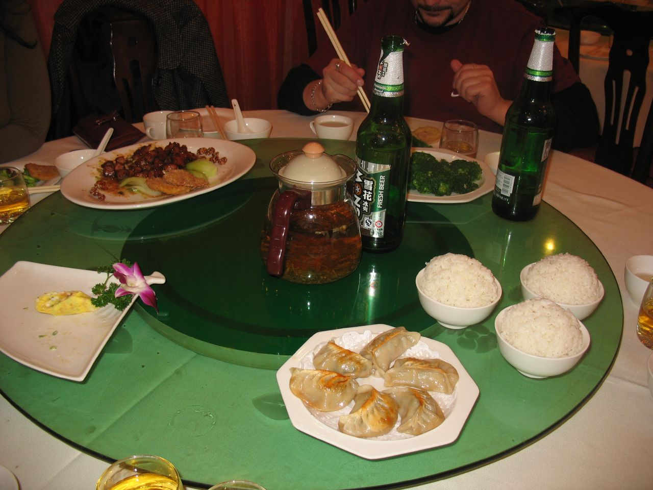 Lazy Susan in Chinese restaurant